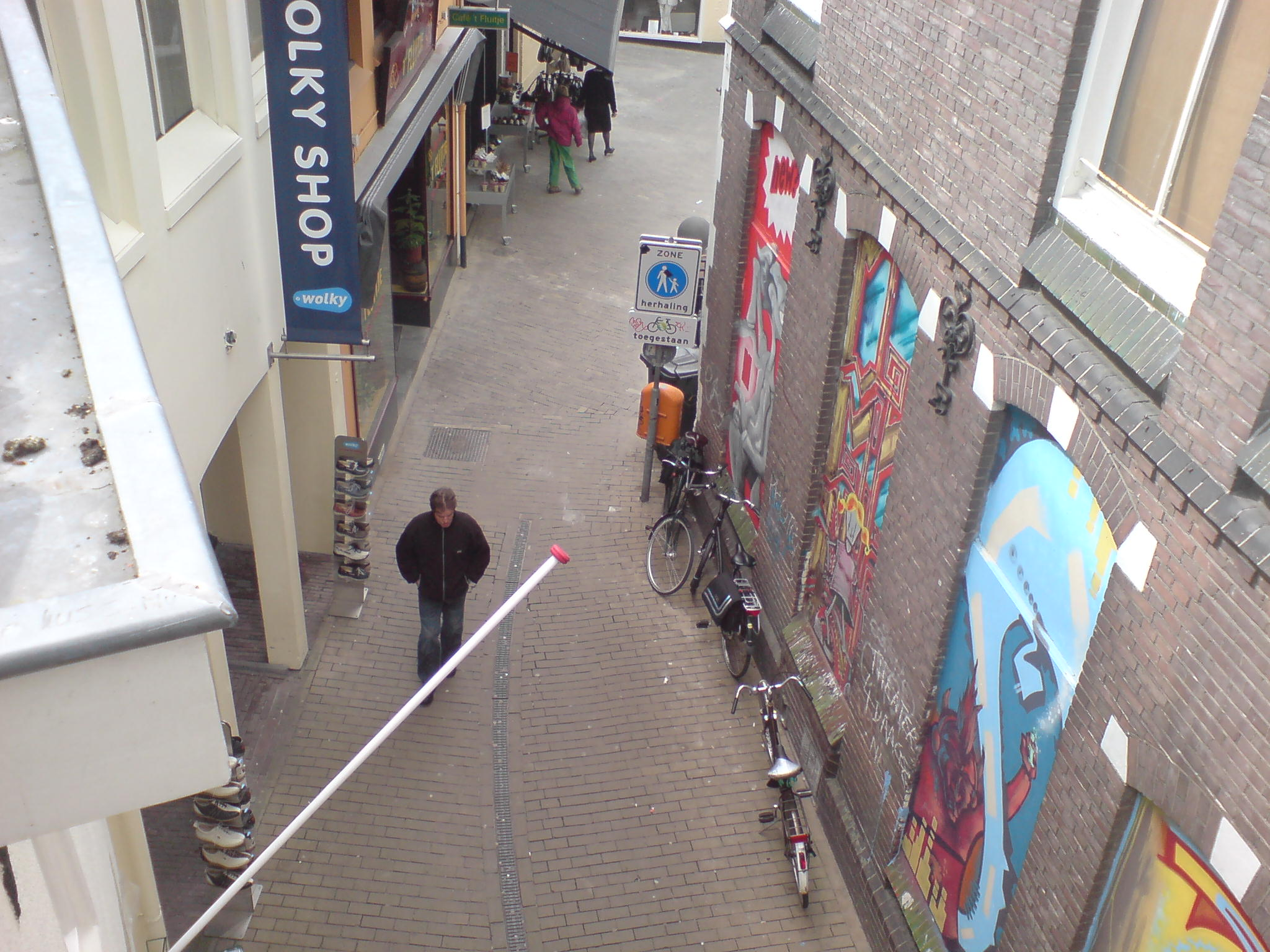 Foto Koningsplen Zwolle, genomen vanuit 5A, richgting Oude Vismarkt